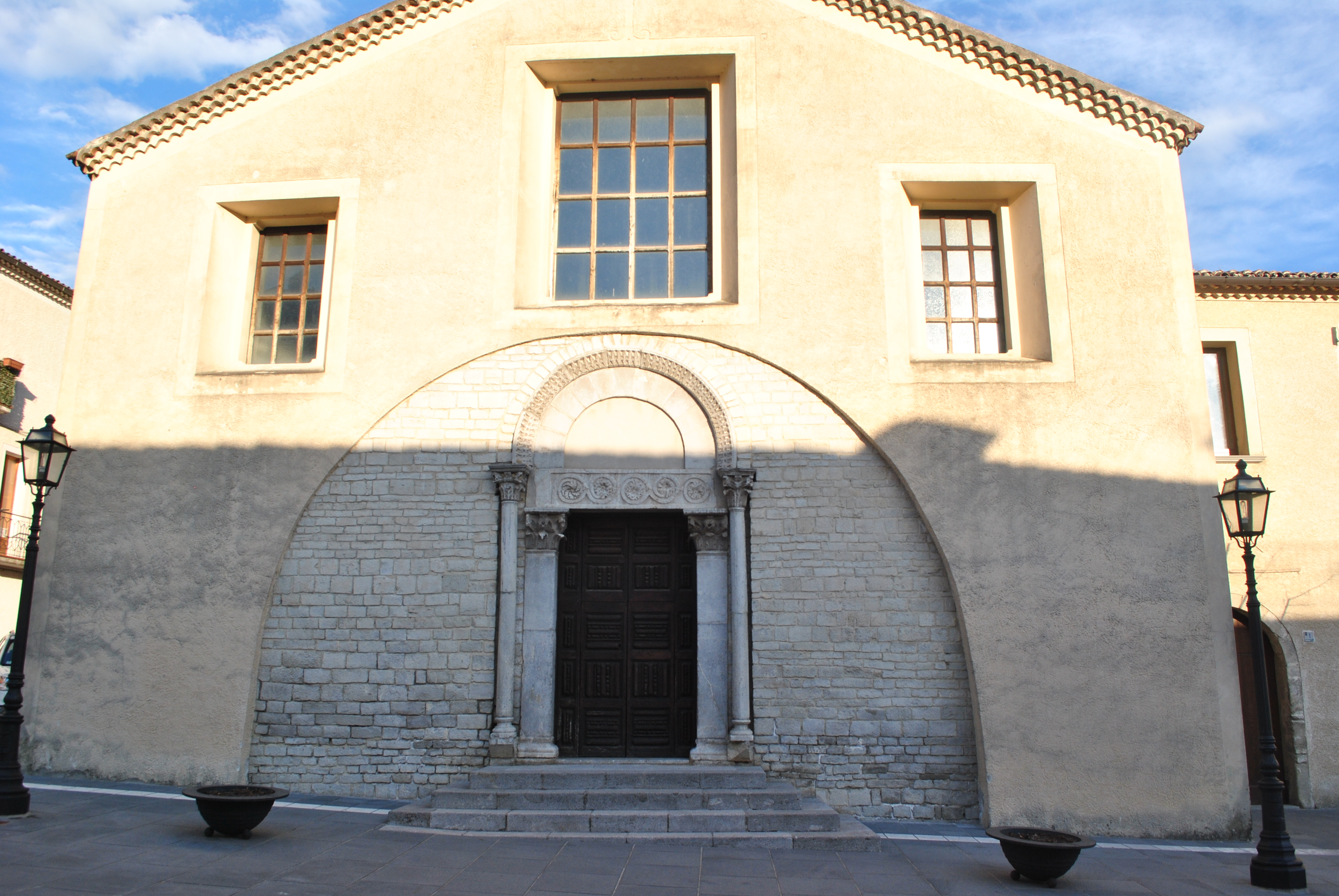 facciata anteriore